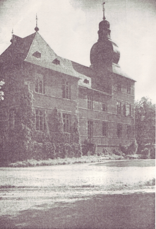 Schloß Leerodt